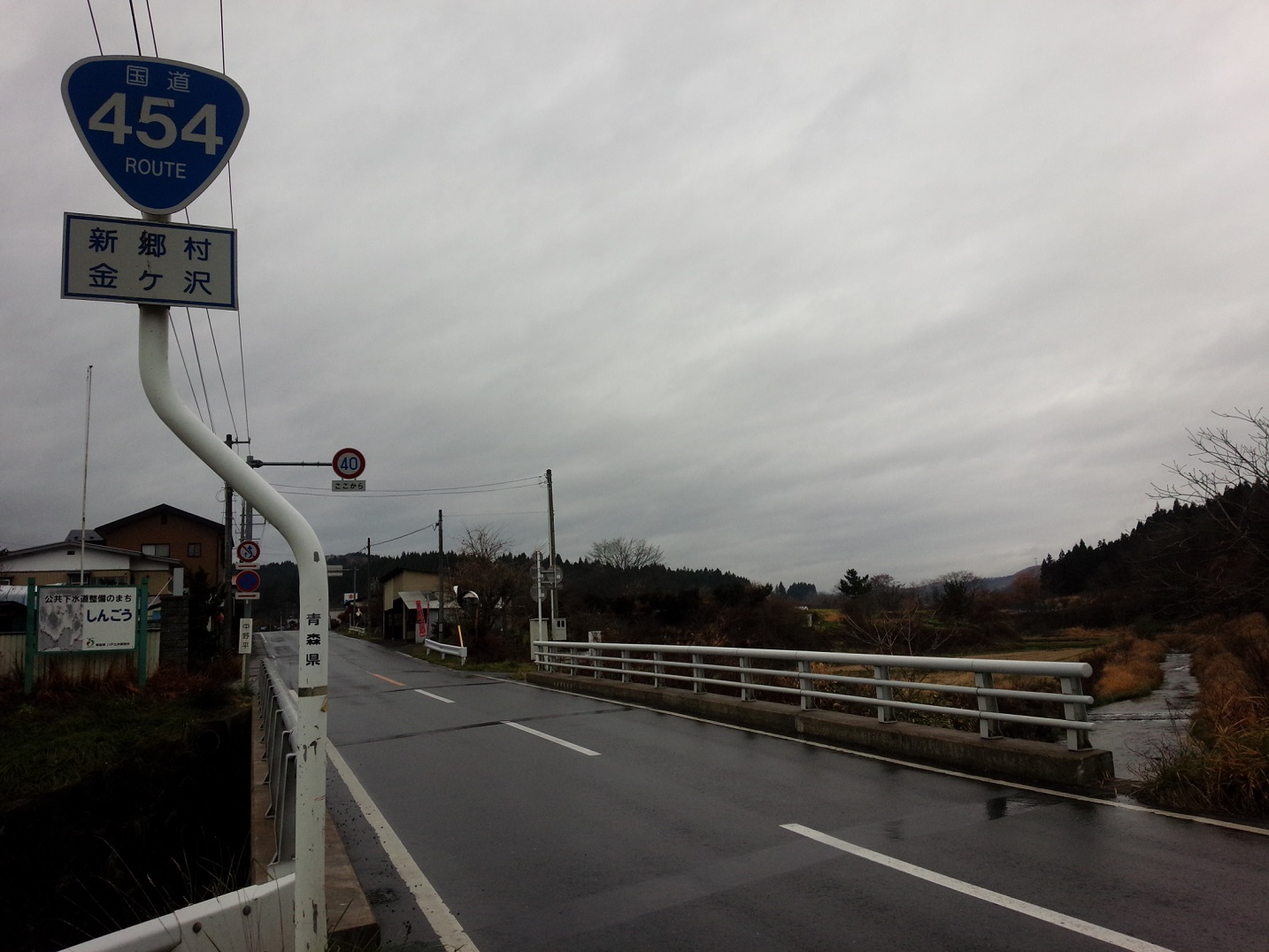 三戸郡新郷村金ヶ沢付近の国道454号。